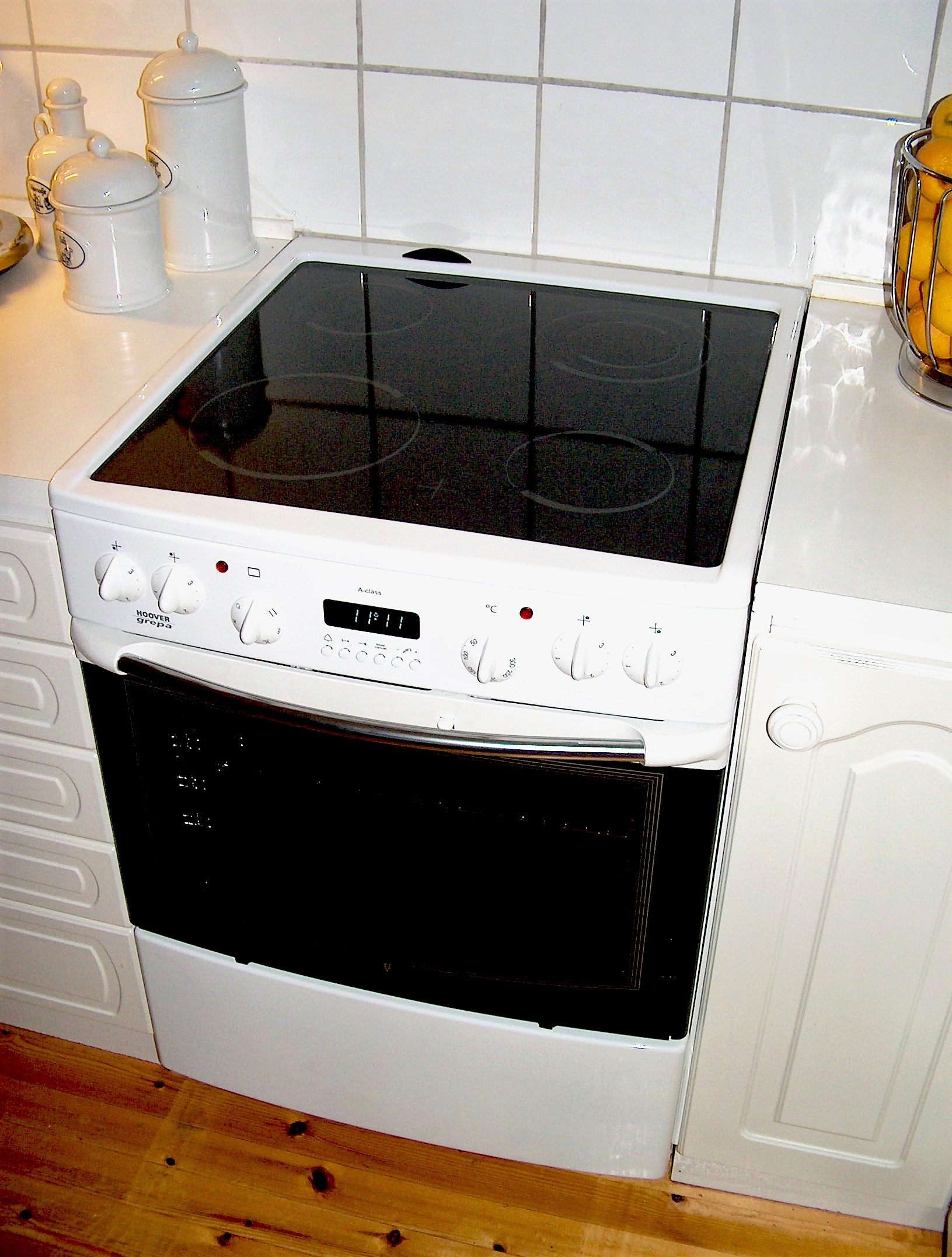 Hoover Grepa HGKW 075 komfyr.